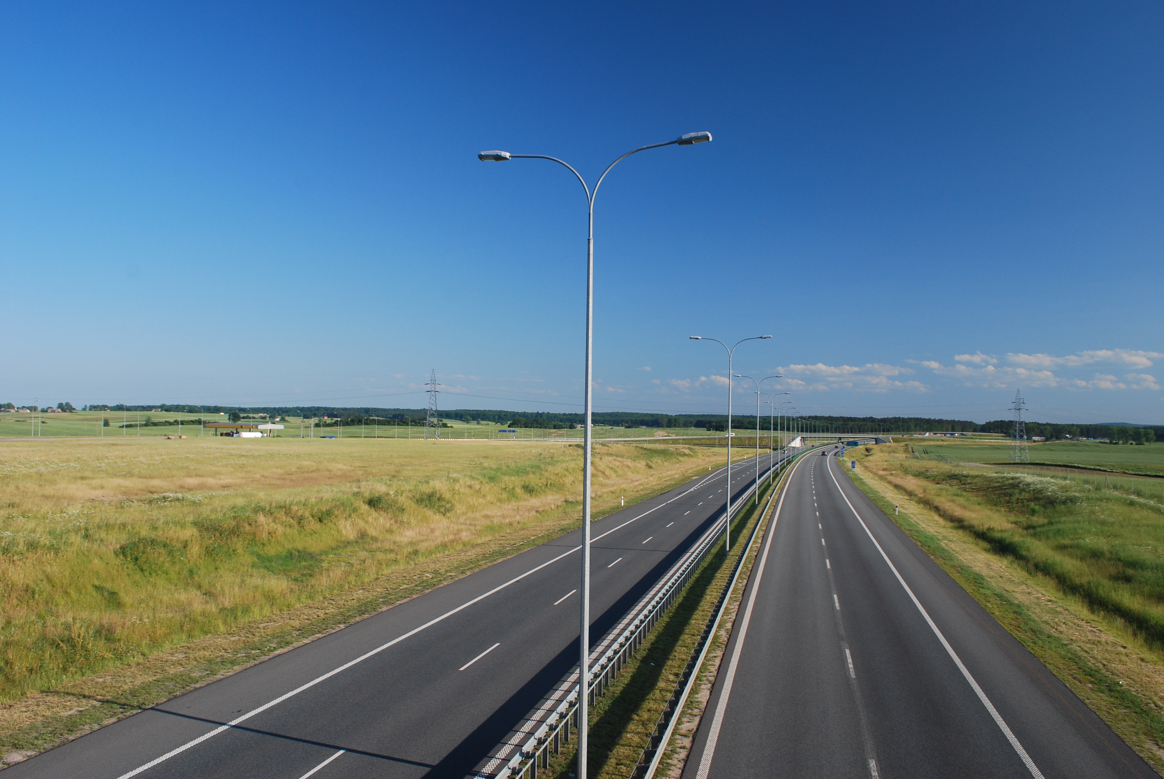 Autostrada A1 pod Swarożynem - kierunek na Łódź.